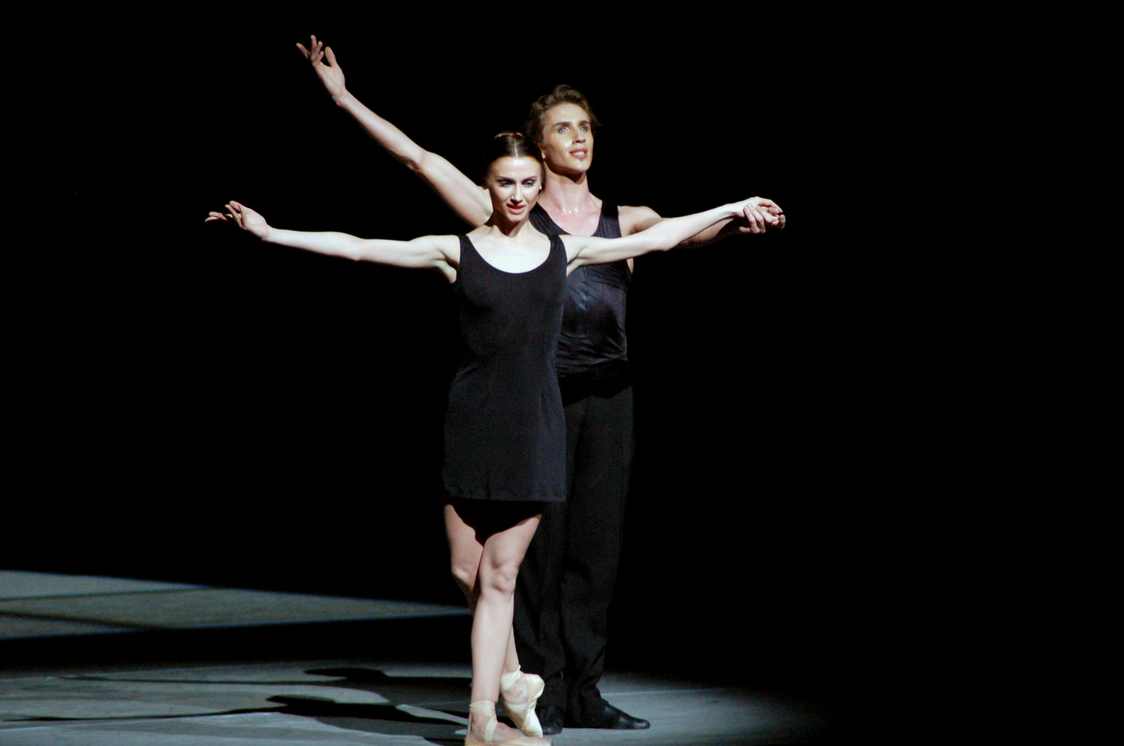 Svetlana Zakharova & Andrei Merkuriev - after "Middle Duet" (Ratmansky-Khanon)